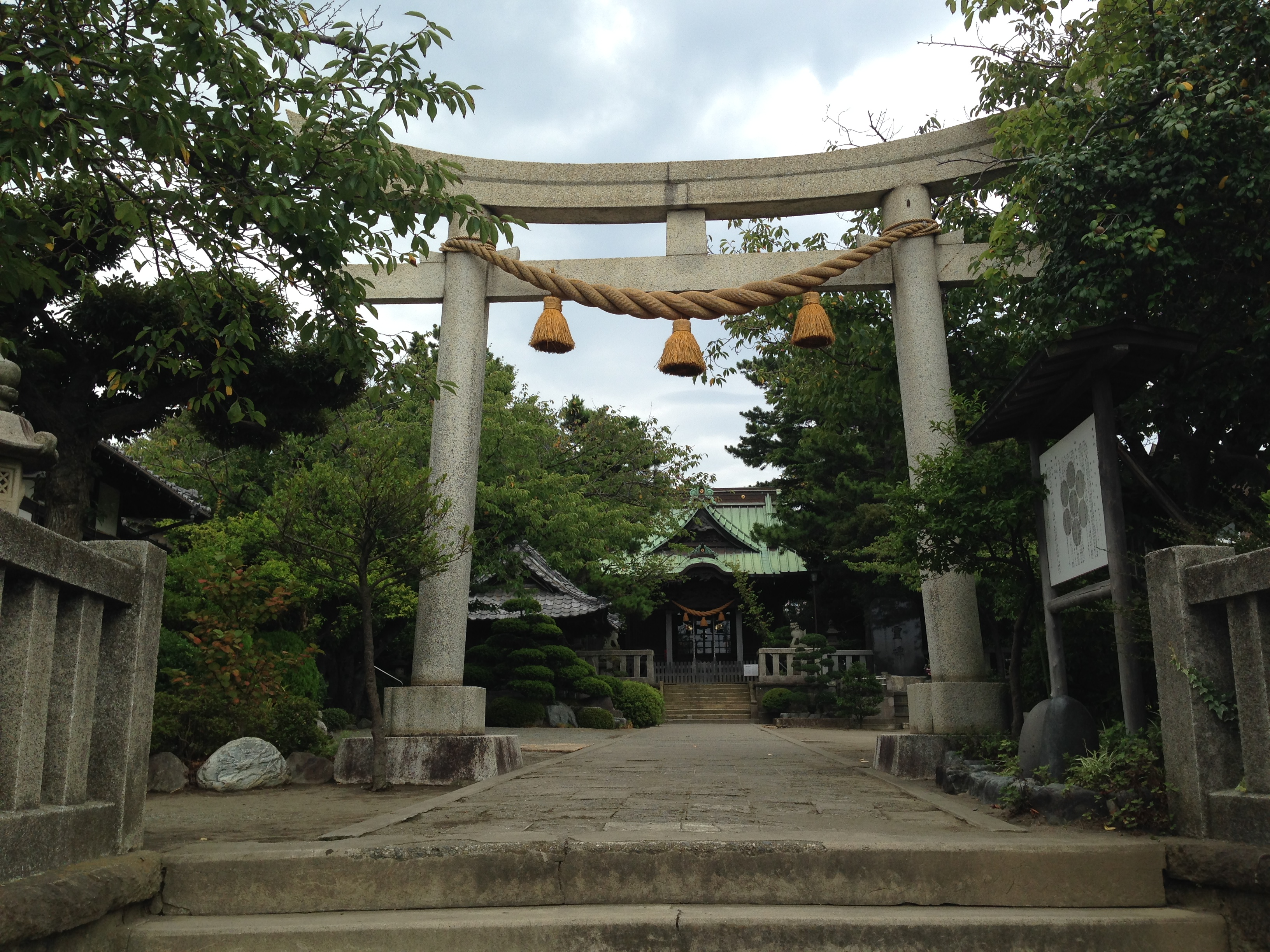 神奈川県茅ヶ崎市にある第六天神社の鳥居。